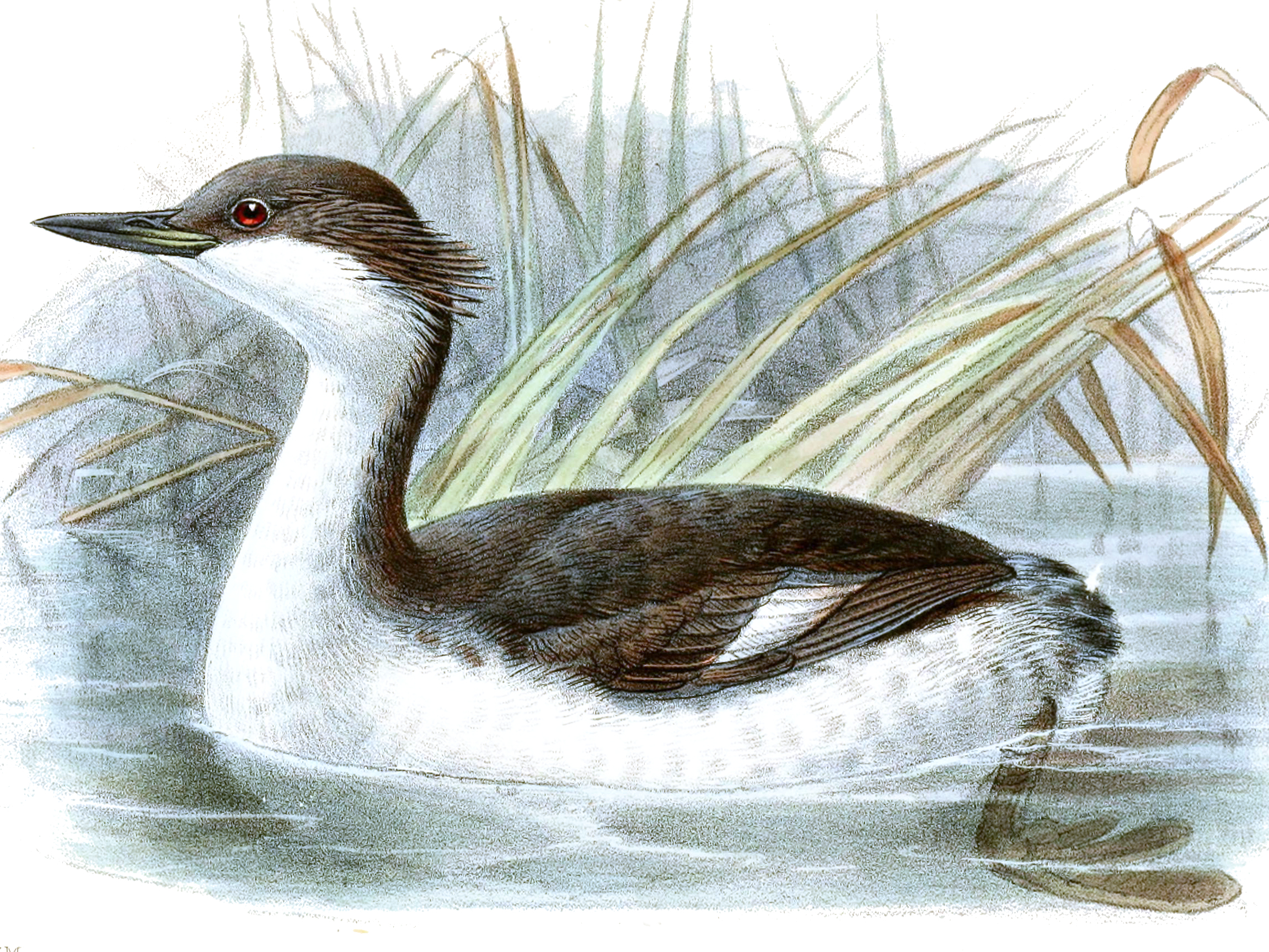 Podiceps taczanowski